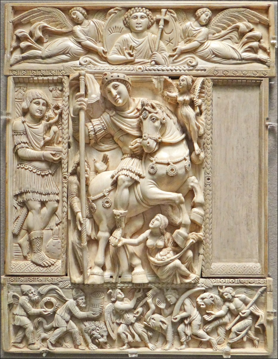 Feuillet de diptyque en cinq parties : L'empereur triomphant (Justinien ?) dit Ivoire Barberini Constantinople première moitié du VIè siècle Ivoire, reste d'incrustations Anc. coll. Peiresc, Barberini ; acq. 1899 Musée du Louvre département des objets C'est une des plus célèbres oeuvres médiévales en ivoire. Ce feuillet de caractère profane est presque complet. Au centre l'empereur triomphant, sur un cheval qui se cabre, tient une lance. Derrière lui, se trouve un soldat vaincu (scythe ou perse). Sous les sabots du cheval, la femme qui porte des fruits symbolise la Terre. Elle touche le pied de l'empereur en signe de soumission. La partie centrale est travaillée en haut relief, certaines parties sont en ronde bosse. c'est un chef d'oeuvre qui montre le niveau de savoir faire atteint par les artisans byzantins. Le personnage sur la plaquette de gauche est un général tenant une Victoire. Il est représenté dans un palais avec un sac d'argent à ses pieds. Il a probablement participé à la campagne militaire. Un personnage du même type devait se trouver sur la plaquette symétrique qui a été perdue. La plaquette du bas représente les peuples vaincus qui apportent leurs tributs aux pieds de l'empereur. La plaquette du haut représente le Christ bénissant, entouré des symboles du Soleil et de la Lune ; il est au centre dans un médaillon porté par des anges. Source : Byzance, catalogue de l'exposition, Editions de la RMN, Paris, 1992